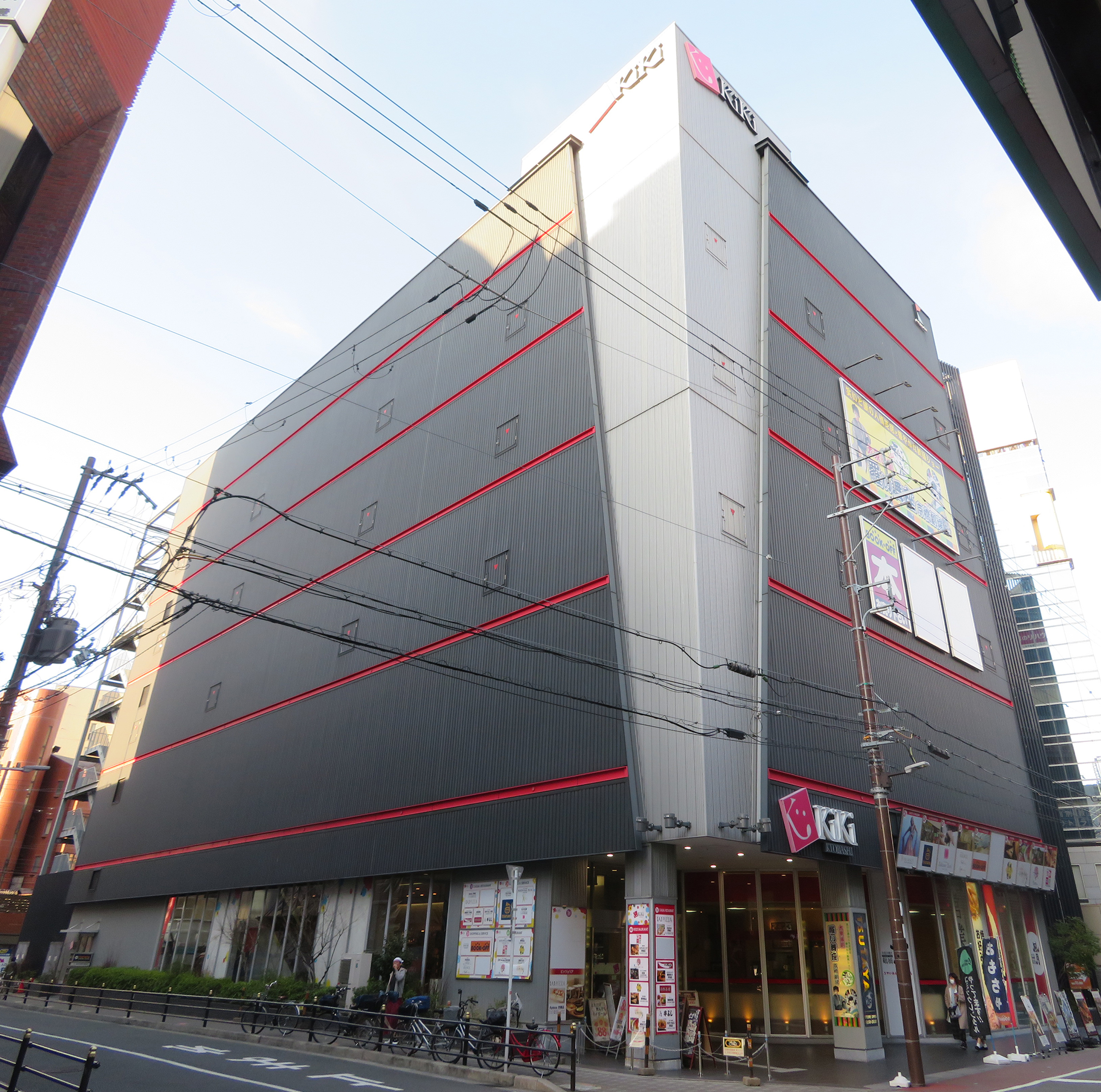 KiKi京橋を撮影。